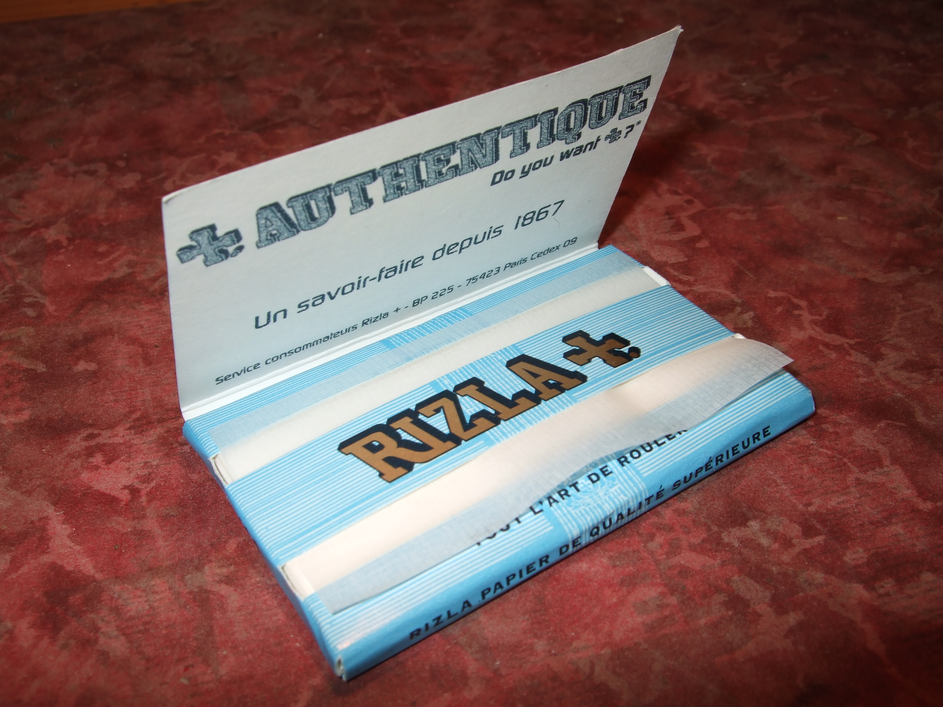 Carnet de 100 feuilles Rizla+